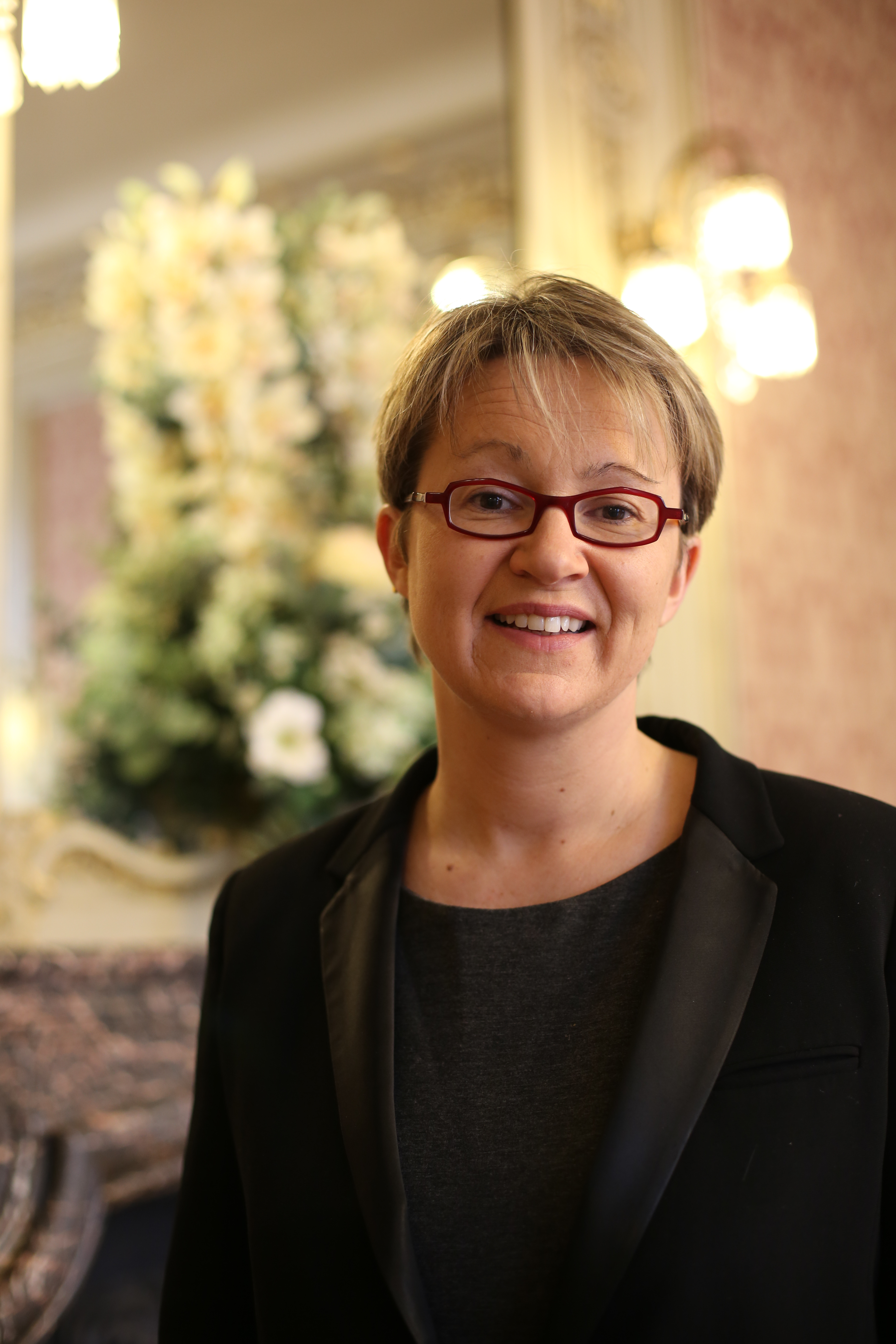 Nathalie Appéré, alors députée de la 2e circonscription d'Ille-et-Vilaine, et candidate PS à la mairie de Rennes